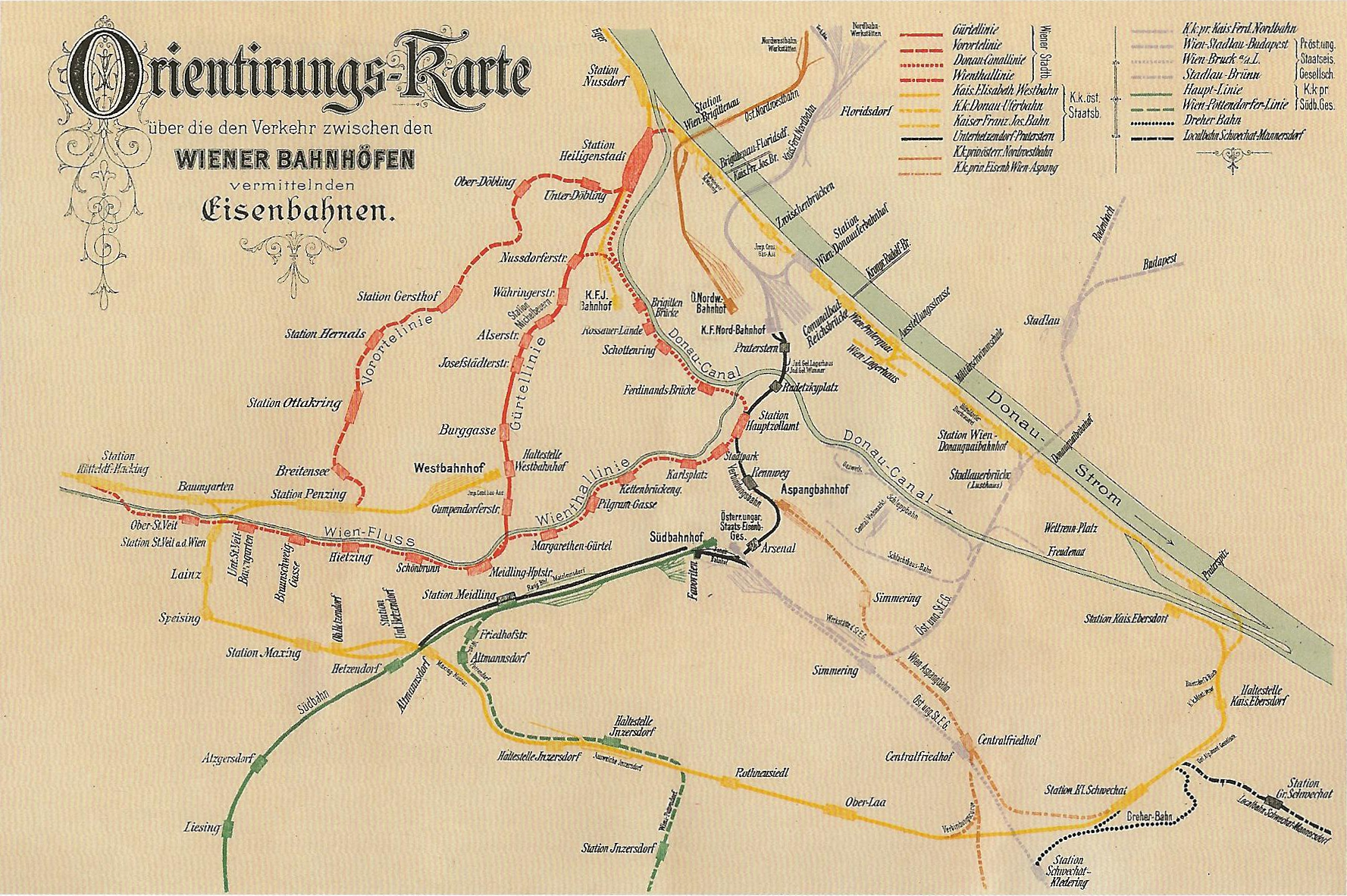 Historia retmapo de la urbfervojo de Vieno